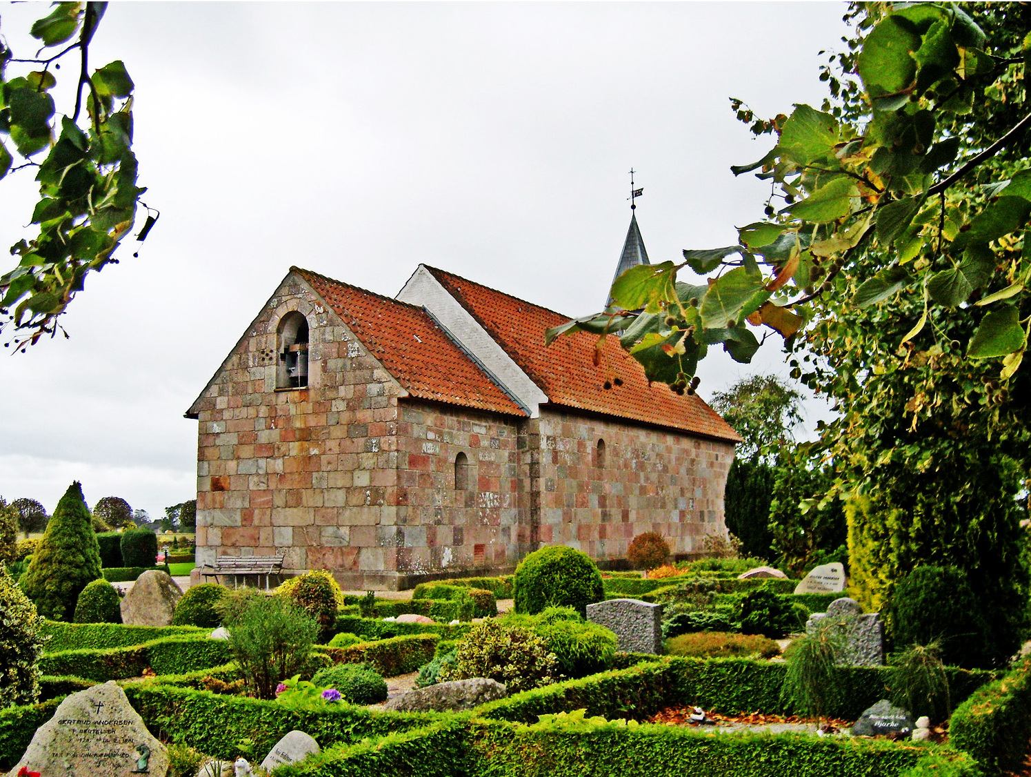 fra nordøst